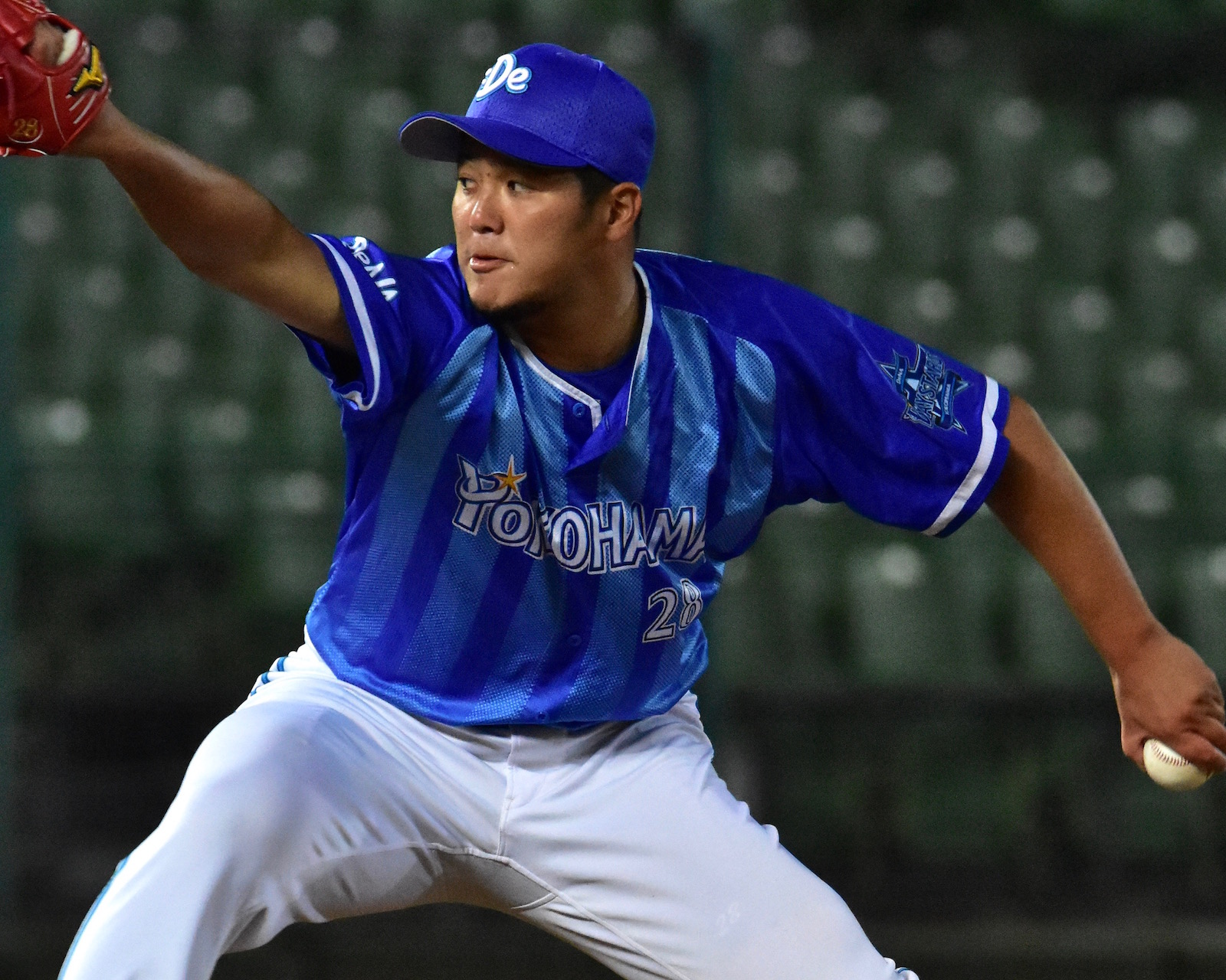 2016年12月18日、台中インターコンチネンタル野球場にて